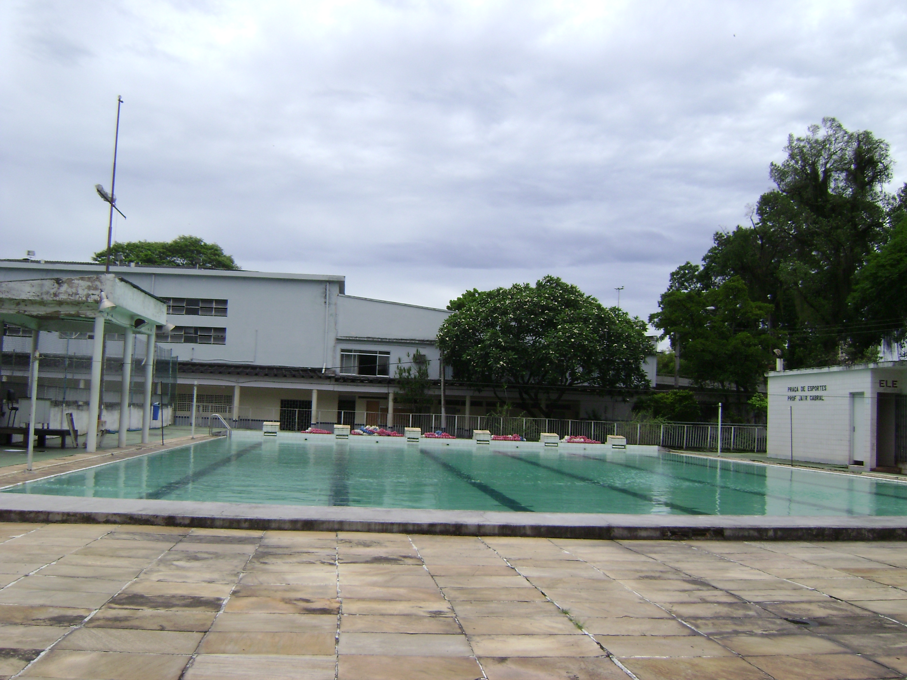 Piscina dentro do campus Maracanã do Cefet/RJ.